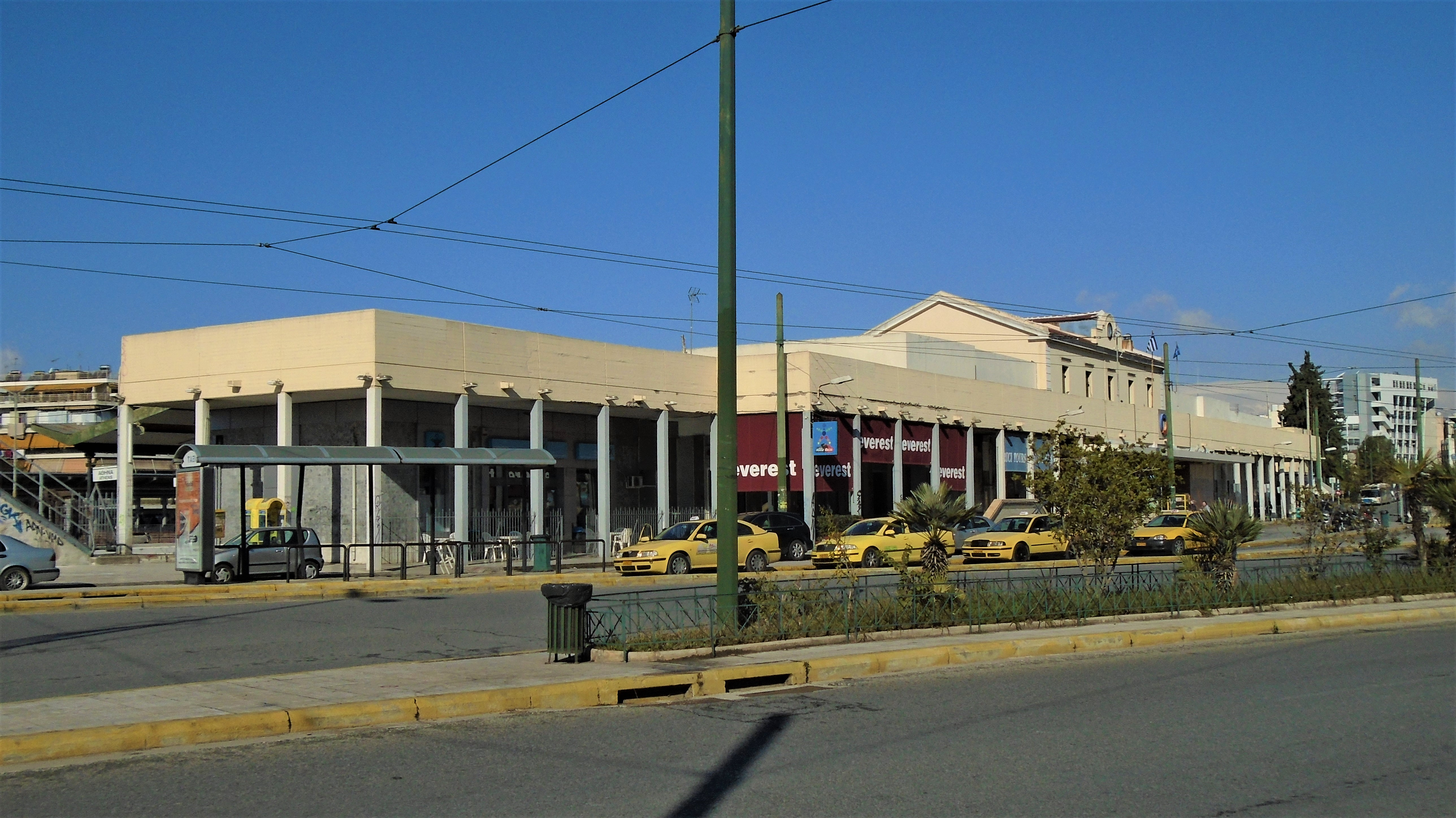 Ο Σιδηροδρομικός Σταθμός Αθηνών (Σταθμός Λαρίσης), φωτογραφημένος από την οδό Δηλιγιάννη τον Ιανουάριο του 2019. Διακρίνεται το αρχικό κτήριο του σταθμού, που εγκαινίαστηκε το 1904, προς τα δεξιά της φωτογραφίας, με την δίρριχτη στέγη και το το ρολόι.